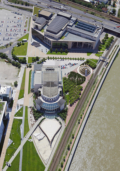 Nemzeti Színház - légi fotó